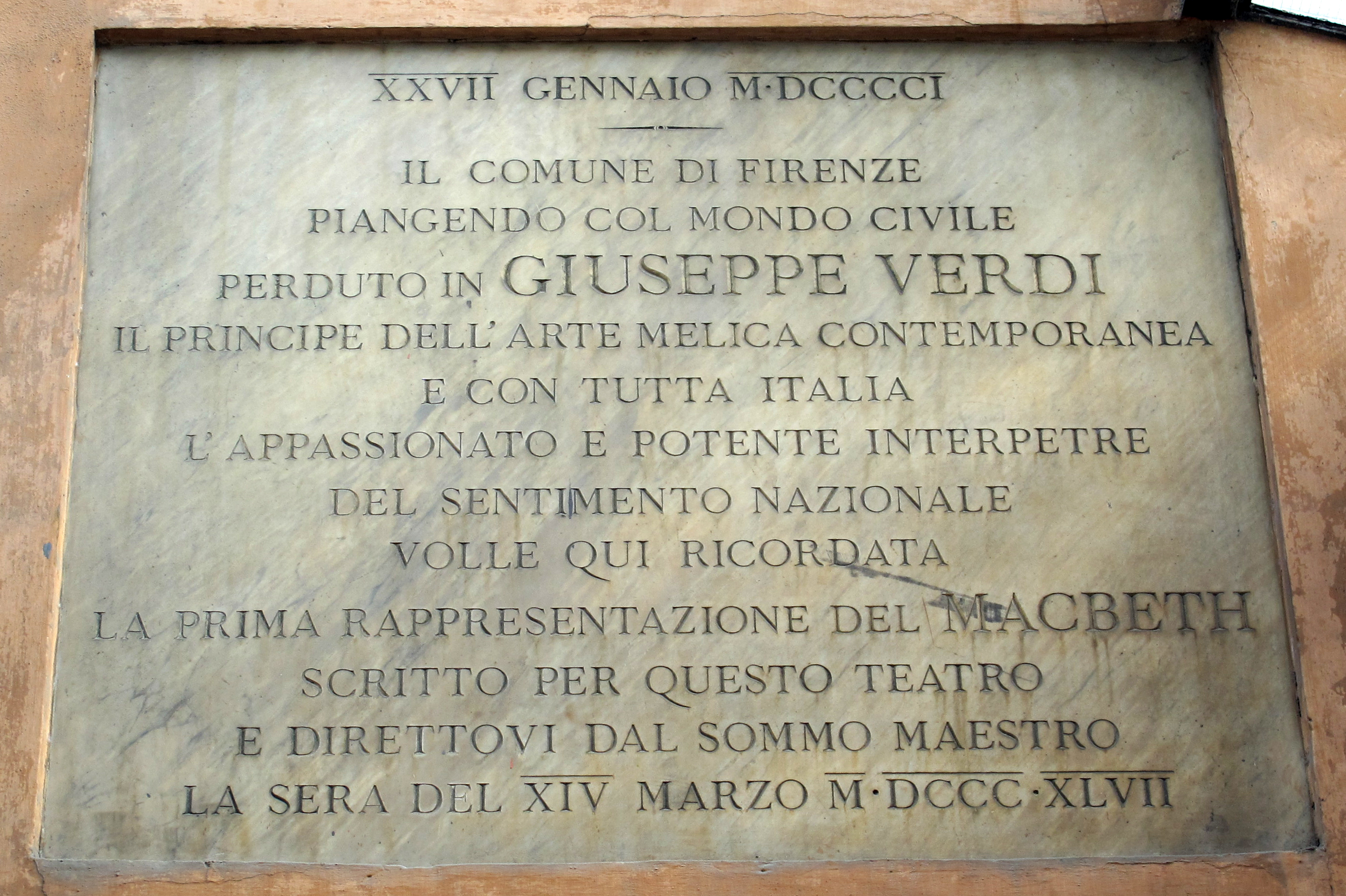 Via della Pergola, Firenze